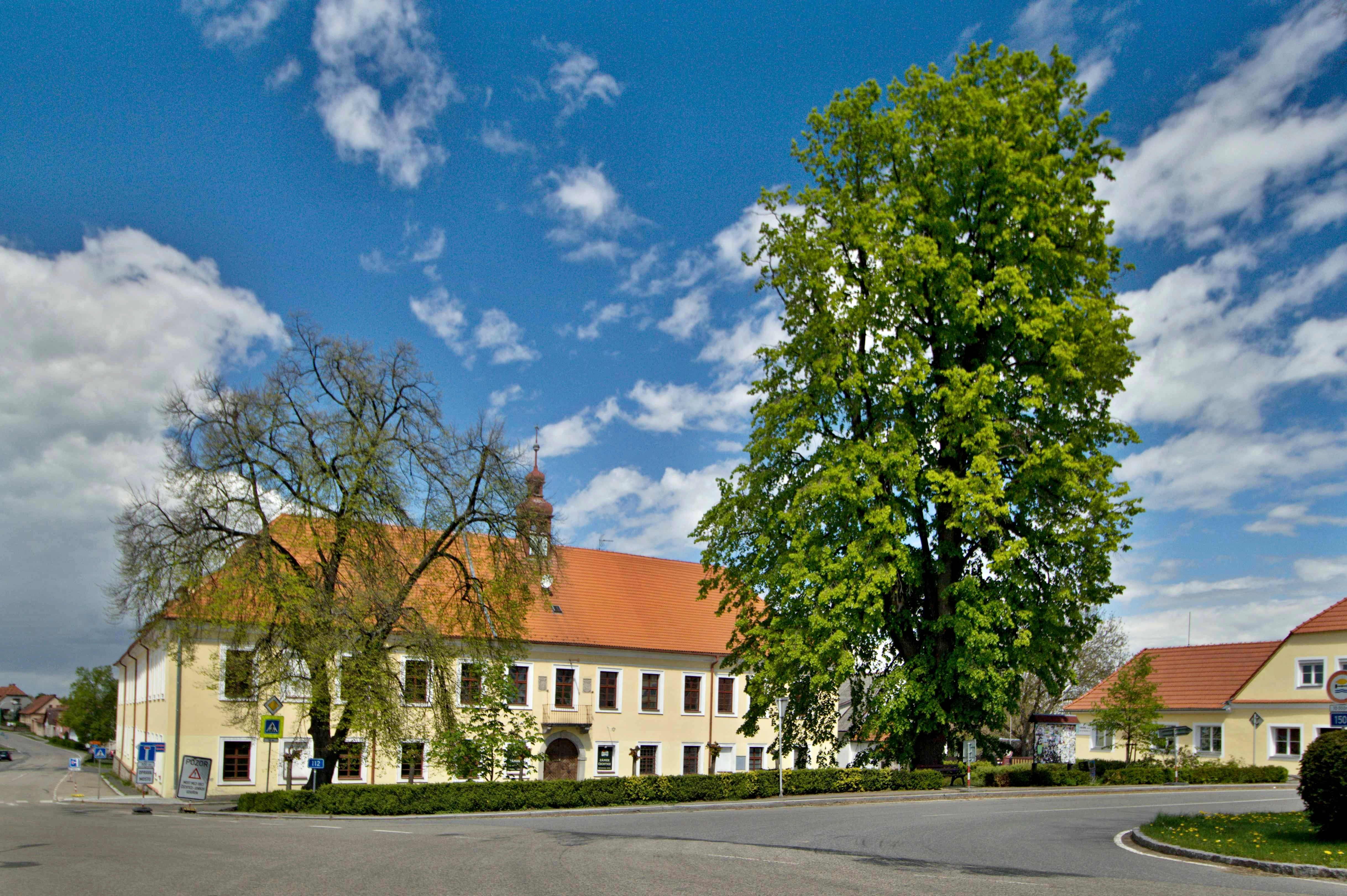 Čechtice, okr. Benešov náves